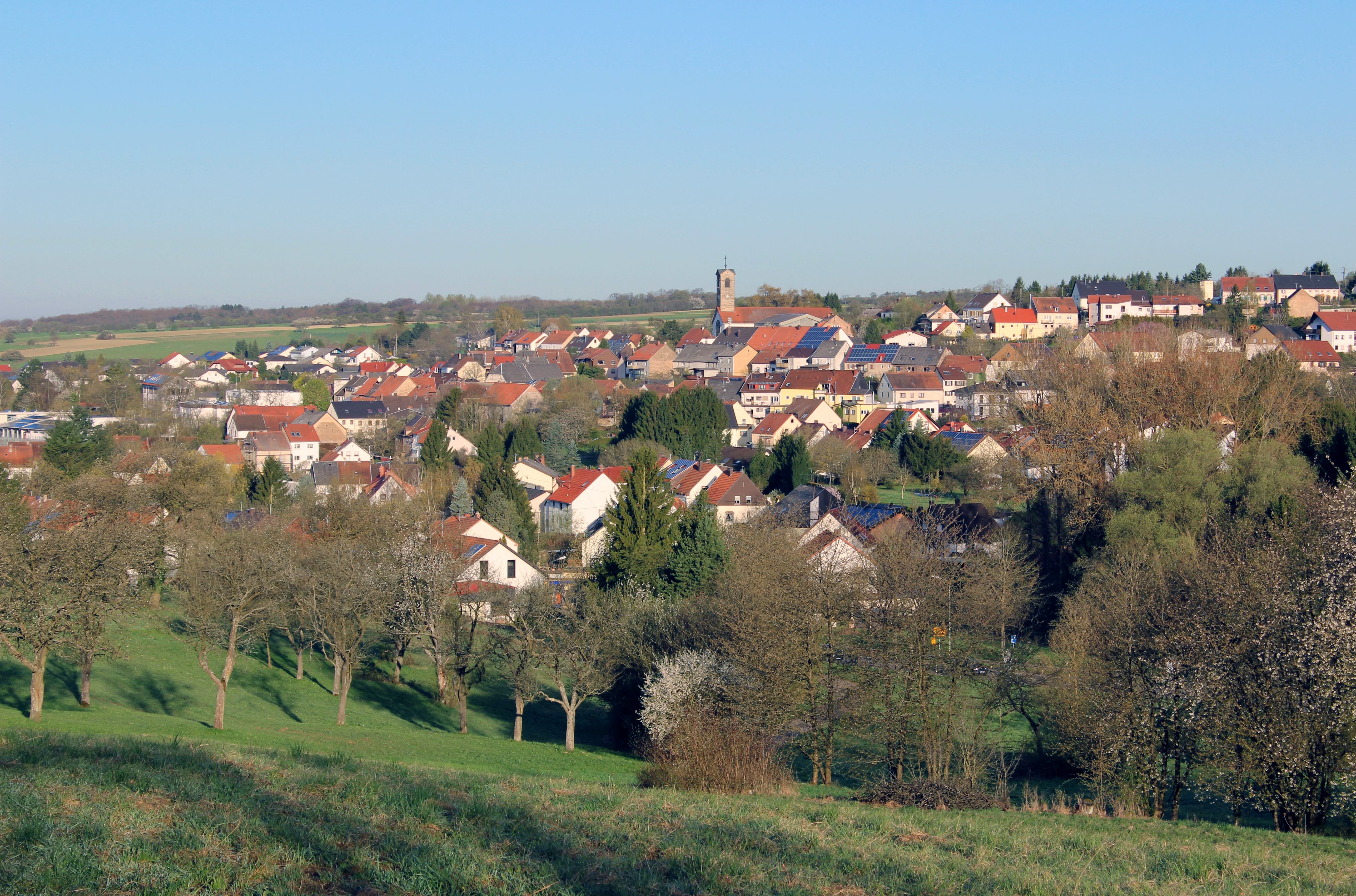 Ansicht von Ommersheim, Gemeinde Mandelbachtal, Saarpfalz-Kreis, Saarland